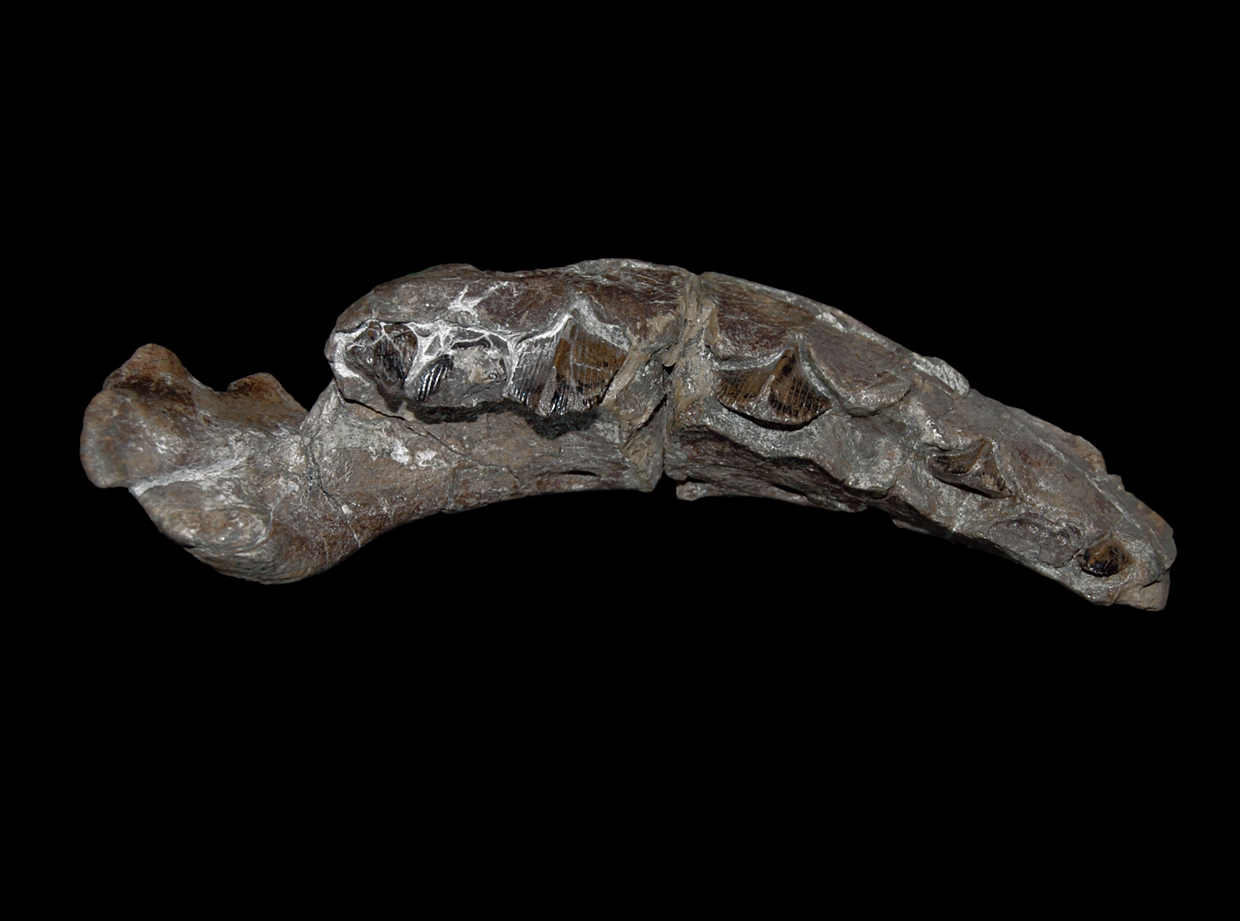 Babes Bolyai paleontology museum